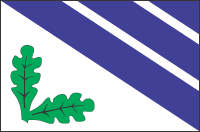 Flag of Rakvere vald, Estonia